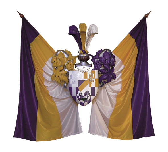 Üliõpilaskorporatsioon Leola vapp koos lippudega.